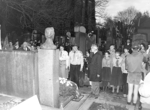 Dne 23.12.1989 oddíl bratří Revilliodových / 43.WPuP, patřící do Českého a slovenského exilového skautingu (a působící současně jako oddíl č.43 Wiener Pfadfinder und Pfadfinderinnen) pod vedením Radka Pavlovce (politického vězně), dovezl poprvé do ČSSR Betlémské světlo, z Vídně do Prahy. Fotografie vznikla u hrobu prof.A.B.Svojsíka. Na pravo od náhrobku, v centrální části fotografie: Ludmila Pavlovcová, Radko Pavlovec, Antonín Sum.